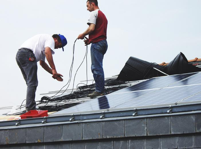 Installation panneaux solaires à Chemillé, Maine et Loire, SCIC Energies Partagées